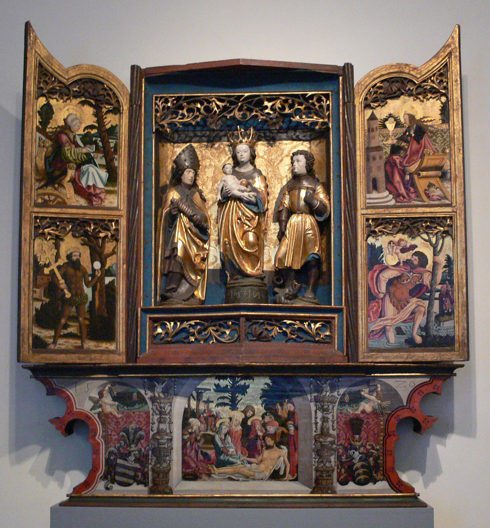 Marienaltar aus der Schlosskapelle St. Georg in Unterelkofen. Meister von Rabenden und Werkstatt; Oberbayern 1517–1520. Altaraufsatz bezeichnet 1517, Predella bezeichnet 1520. Predella mit den Wappen des Hildebrand von Kitscher und der Barbara von Stadion. Bayerisches Nationalmuseum München, erworben 1909, Inv. Nr. R 8835.